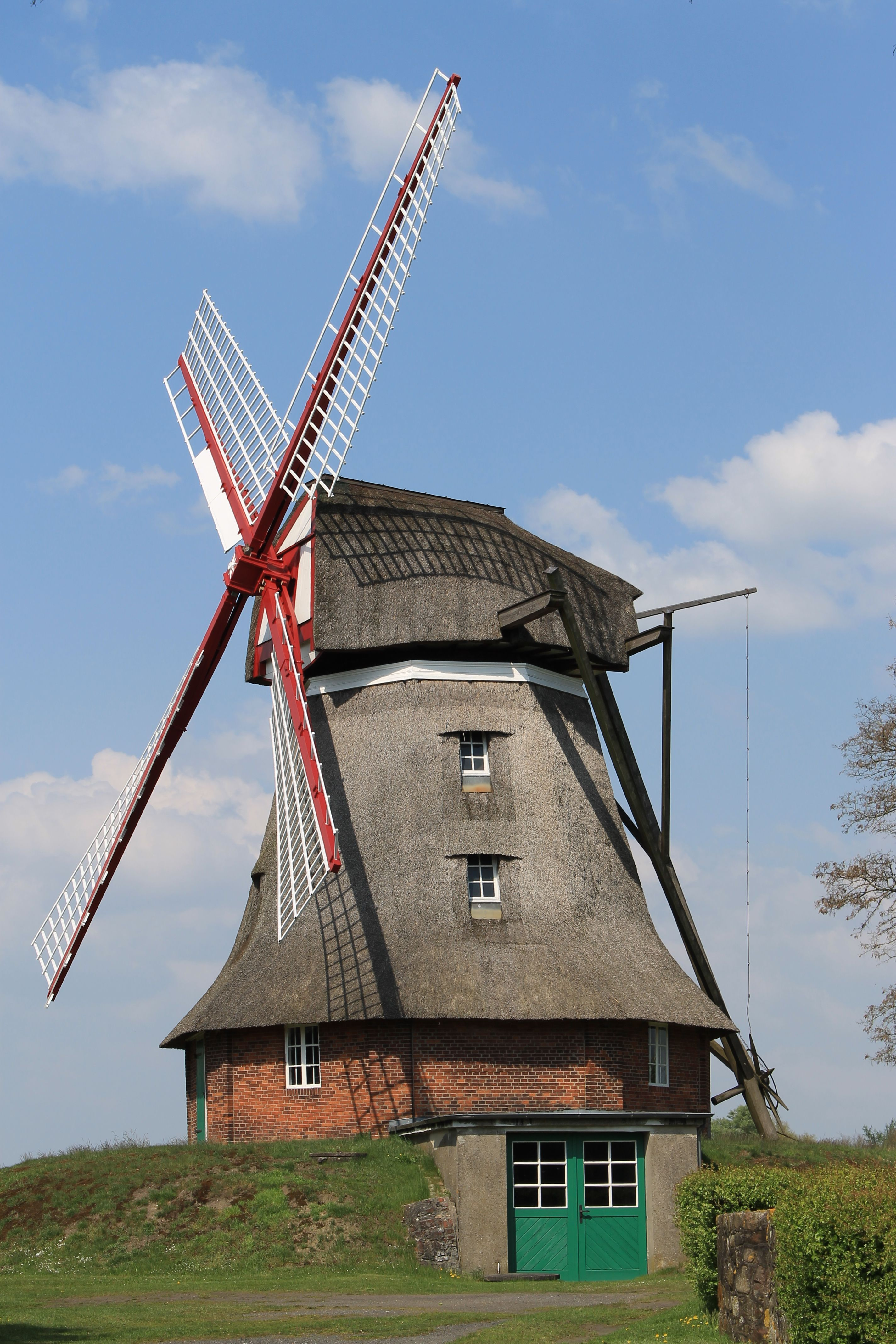 Rekumer Mühle in Bremen, An der Rekumer Mühle 12Das abgebildete Objekt ist ein geschütztes Kulturdenkmal in der Freien Hansestadt Bremen, mit der Nr. 1269 beim Landesamt für Denkmalpflege registriert.